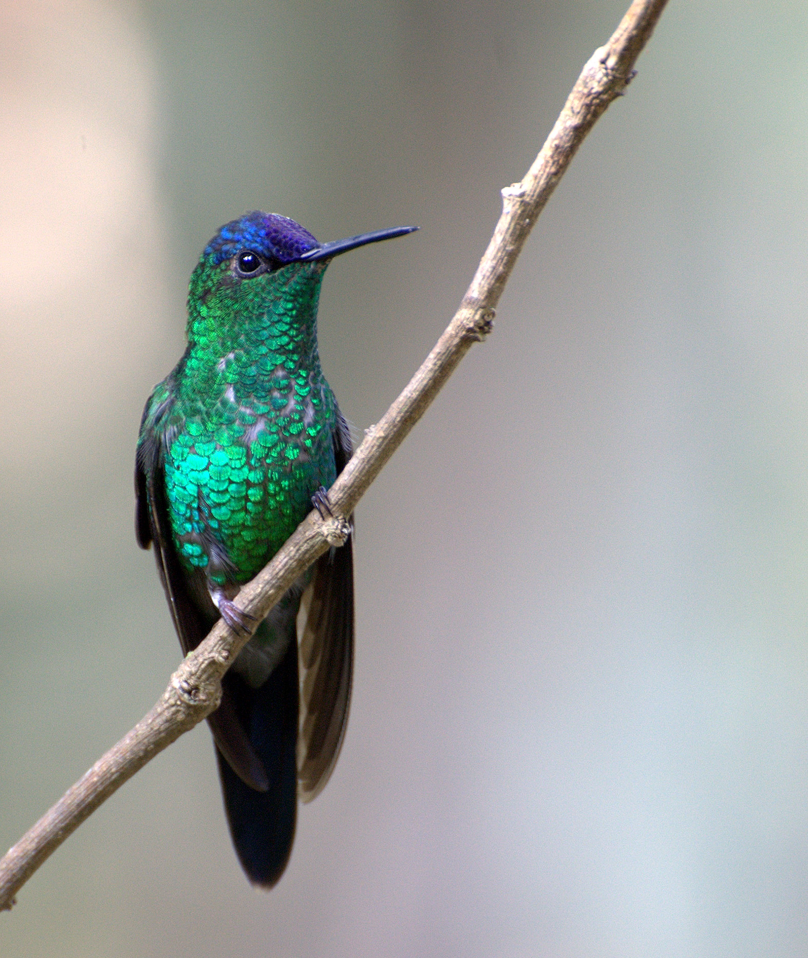 Thalurania glaucopis, from Pico do Jaraguá em São Paulo-SP (Brazil)